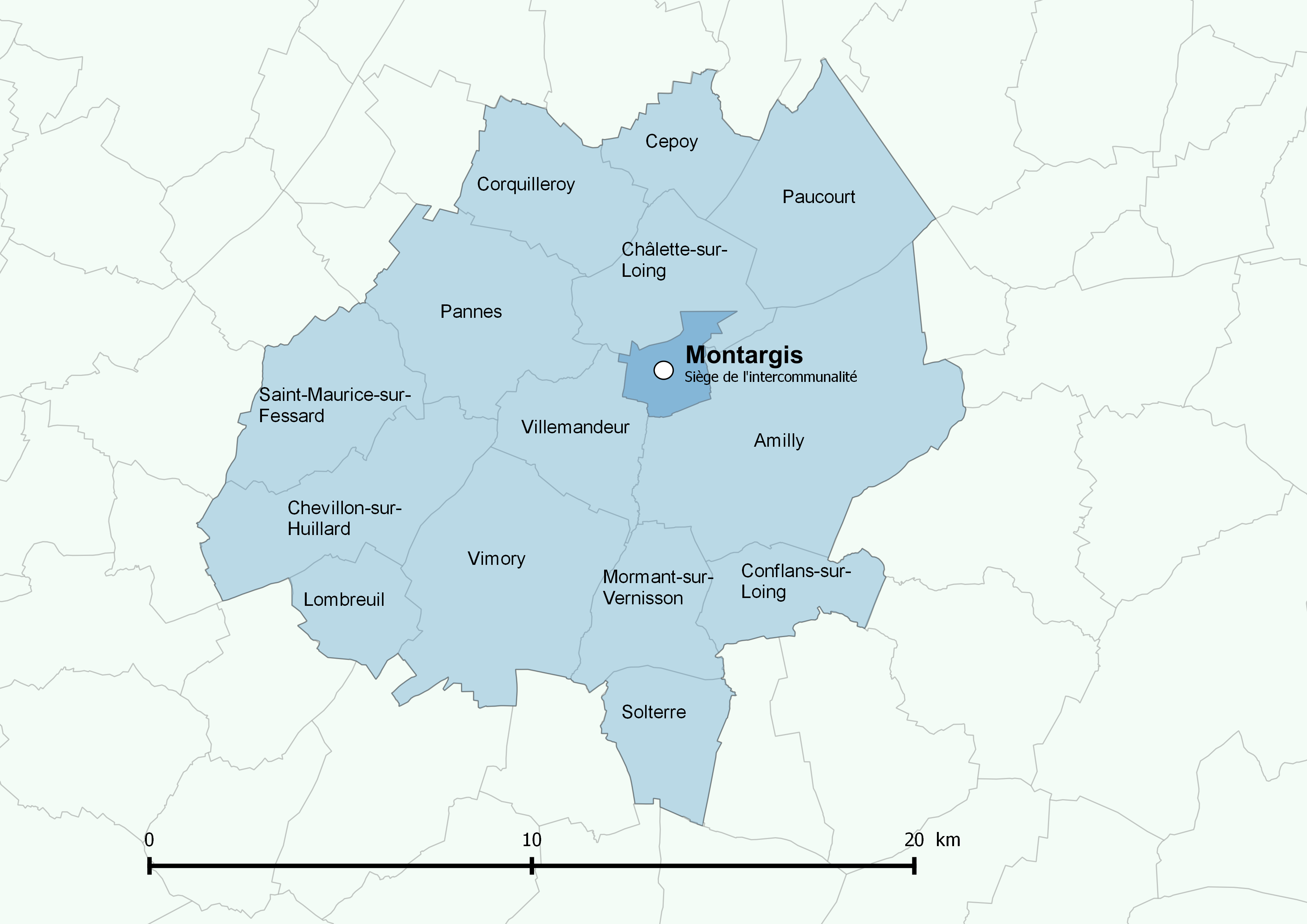 Périmètre de l'Agglomération montargoise et rives du Loing - Positionnement de la commune de Montargis